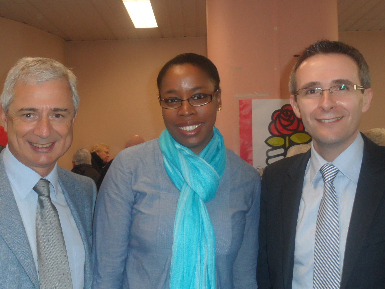 De droit à gauche : Stéphane Troussel, conseiller général de La Courneuve, Zainaba Saïd-Anzum, sa suppléante et Claude Bartolone, président du Conseil général de la Seine-Saint-Denis.